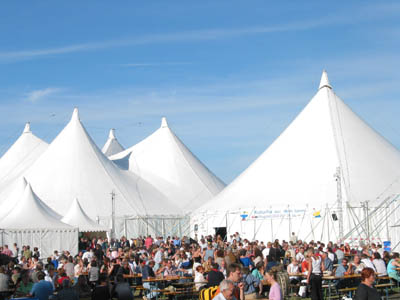 Die Zelttheaterstadt des internationalen Musik- und Theaterfestivals KulturPur auf dem Giller in Hilchenbach-Grund